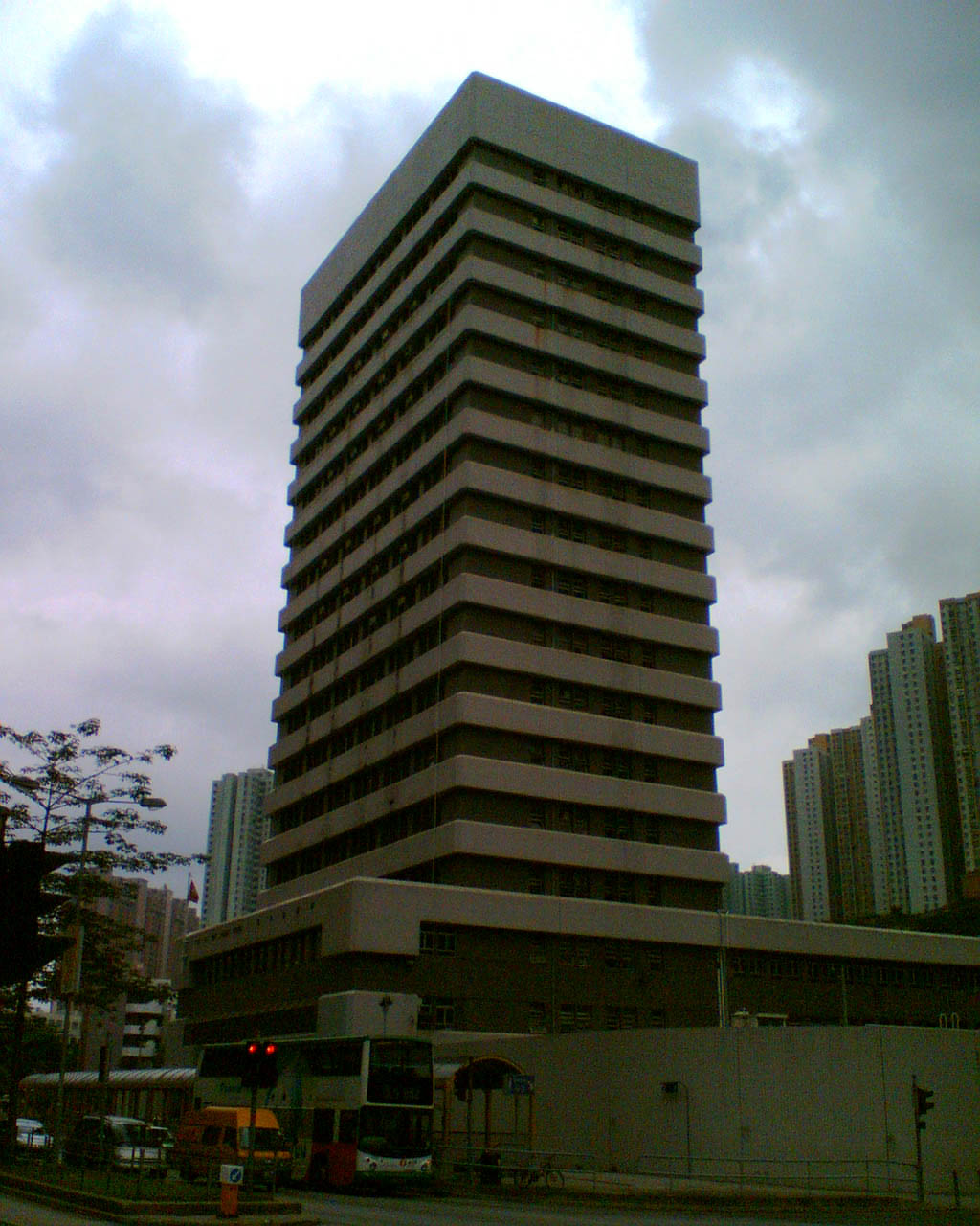 馬鞍山分區警署